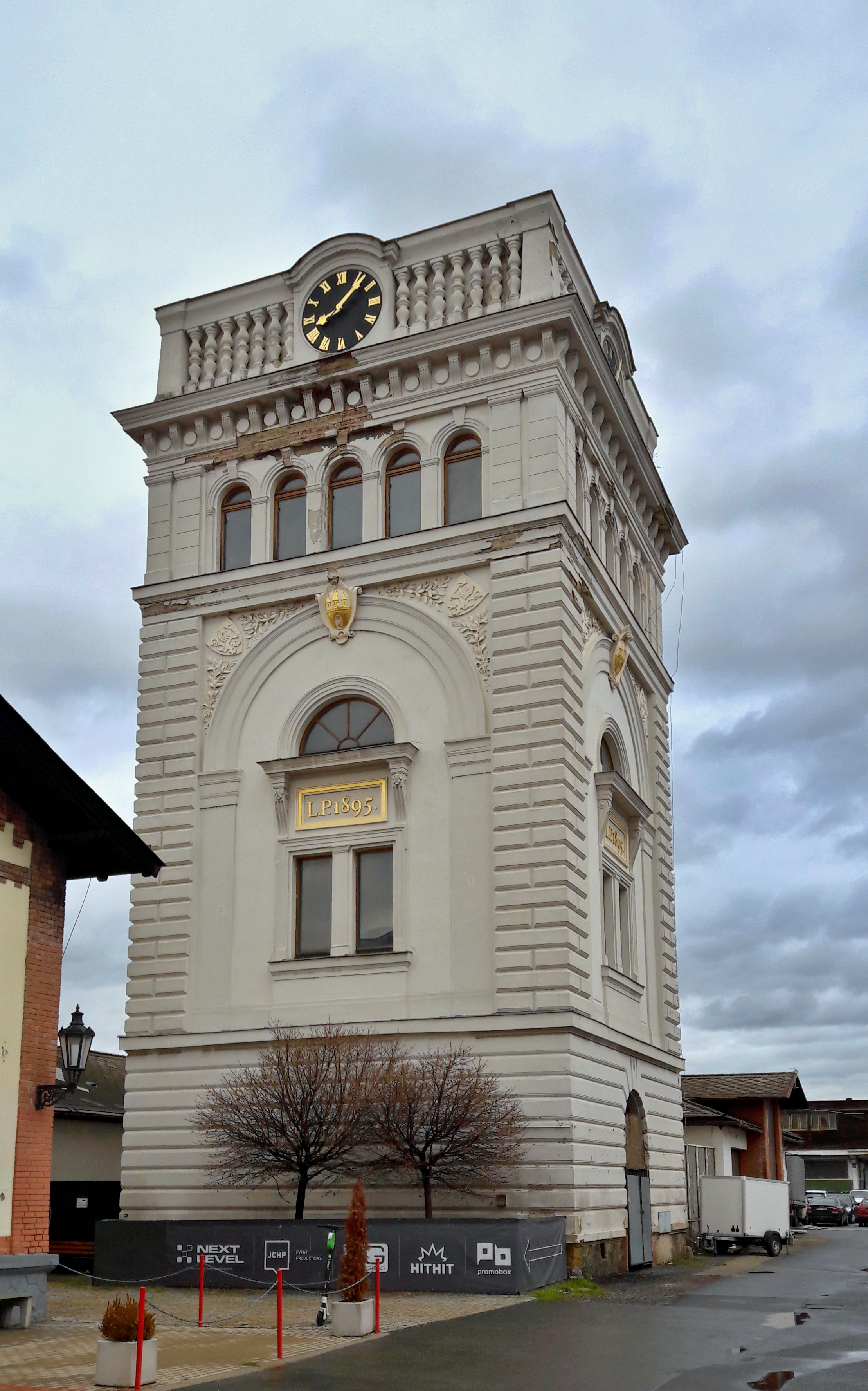 Holešovická tržnice